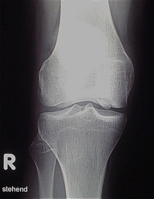 Osteochondrosis dissecans Röntgen noch in Situ